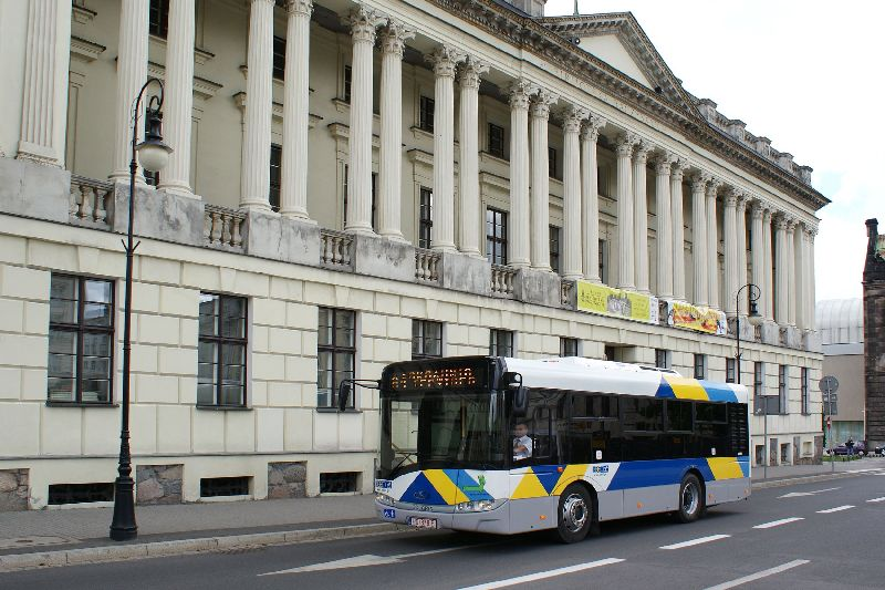 Alpino 8,6